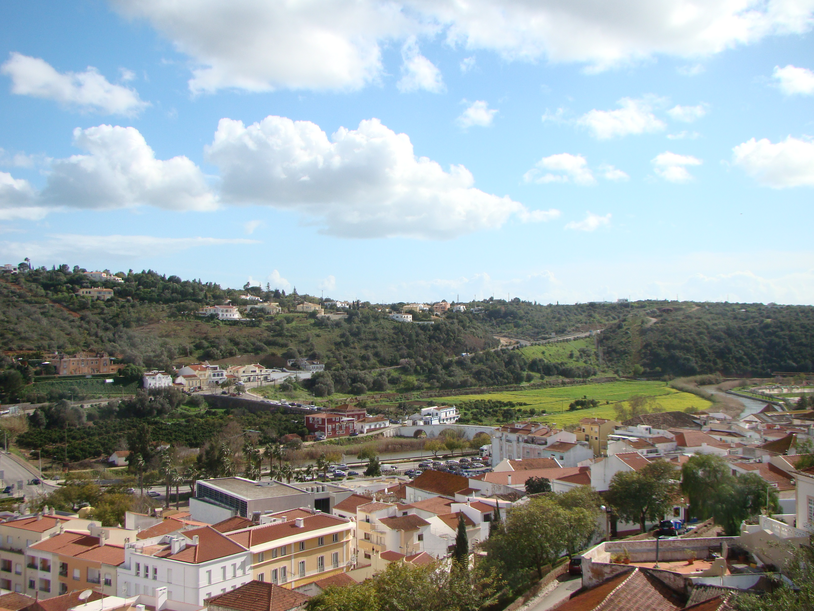 Silves - vista do castelo 03/2018.